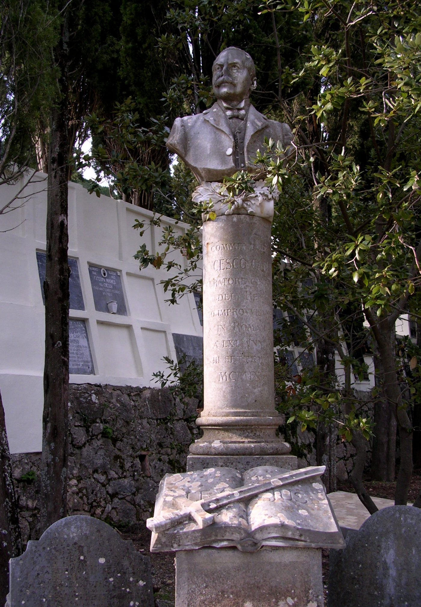 Tomba Monumentale di Francesco Cannas di Ulassai, Procuratore Generale del Re d'Italia.